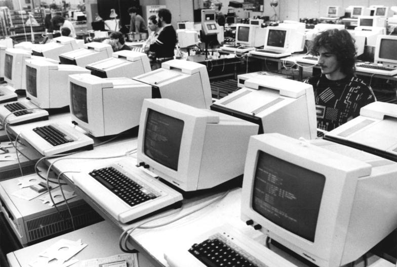 VEB Robotron Elektronik Dresden, Computer A 7100 ADN-ZB Häßler 30.12.87 Dresden: Computer- Der 10 000. zusätzlich produzierte Arbeitsplatzcomputer vom Typ "A 7 100" wurde im Dresdner Stammbetrieb des Kombinates VEB Robotron übergeben. Die Belegschaft löste damit im zu Ende gehenden Jahr 1987 eine volkswirtschaftlich bedeutsame Wettbewerbsverpflichtung ein, die sie Mitte Mai übernommen hatte. Bei einem Dauertest in einer der Montagehallen sind die Computer über Stunden einer Belastung ausgesetzt.